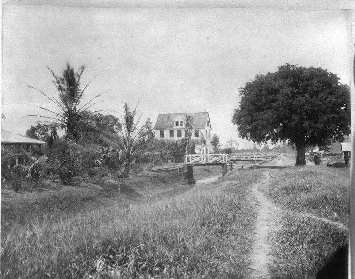 Foto. Plantage Zoelen in het Commewijnedistrict in Suriname.